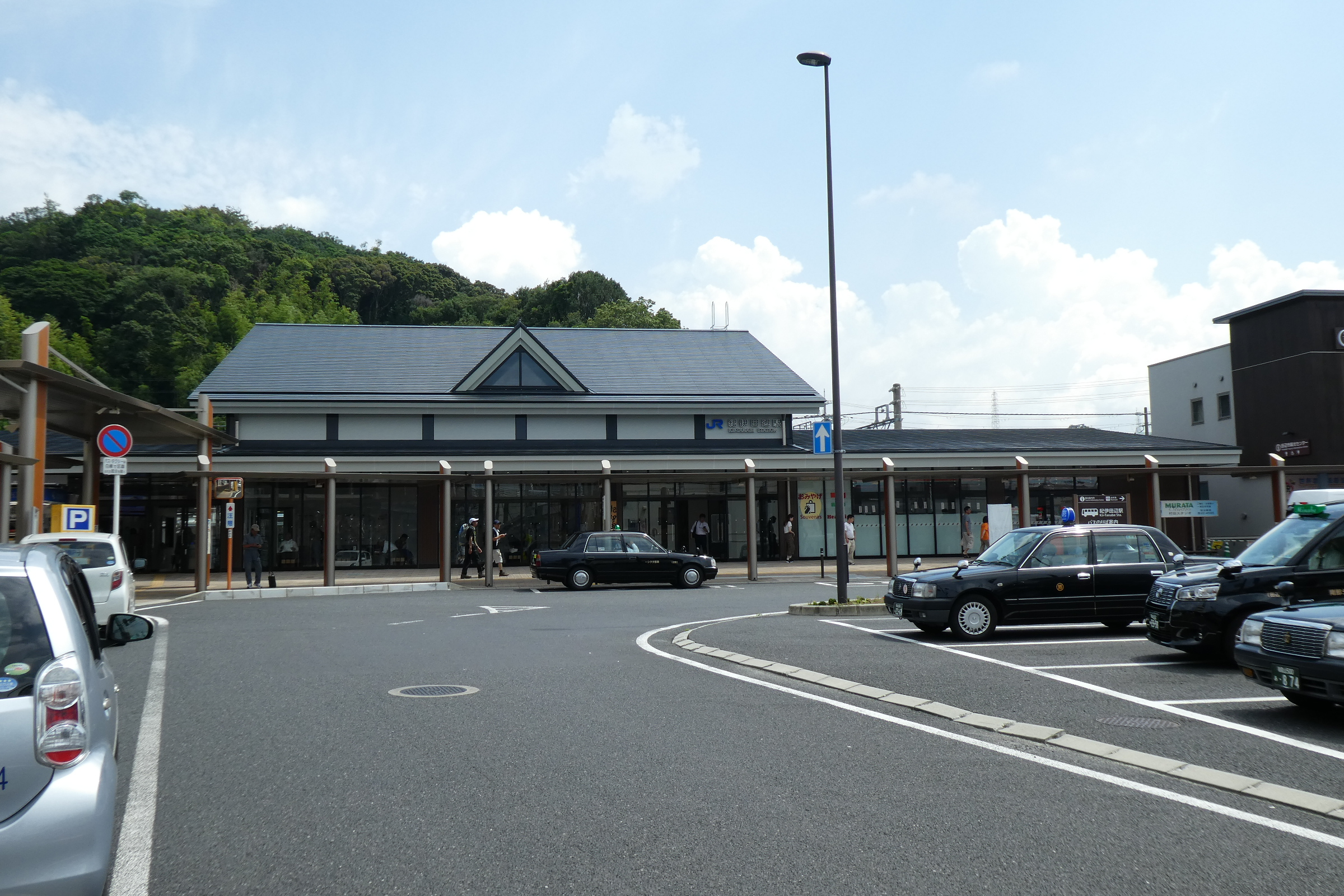 西日本旅客鉄道（JR西日本）紀勢本線（きのくに線）紀伊田辺駅